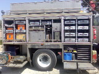 ראם-משאית יעודית הכוללת את כלי החילוץ